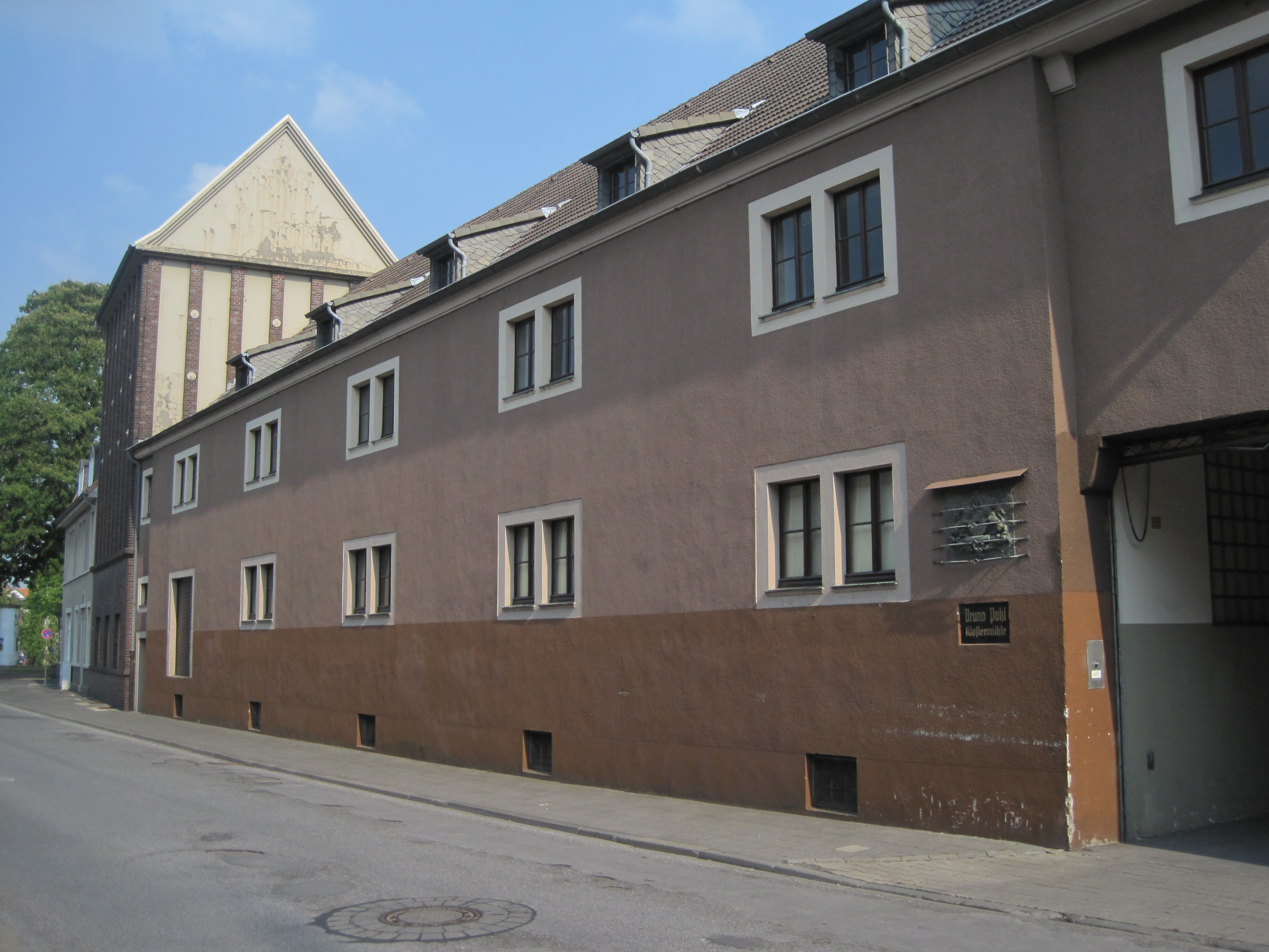 Dieses Foto zeigt die Klostermühle Bruno Pohl neben der St. Agnes-Kirche in Hamm.